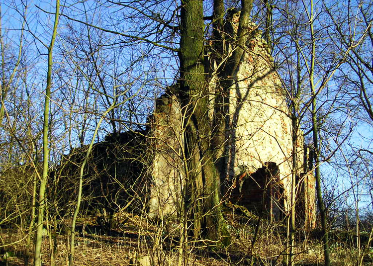 Zrujnowany barokowy kościół w Dłusku.